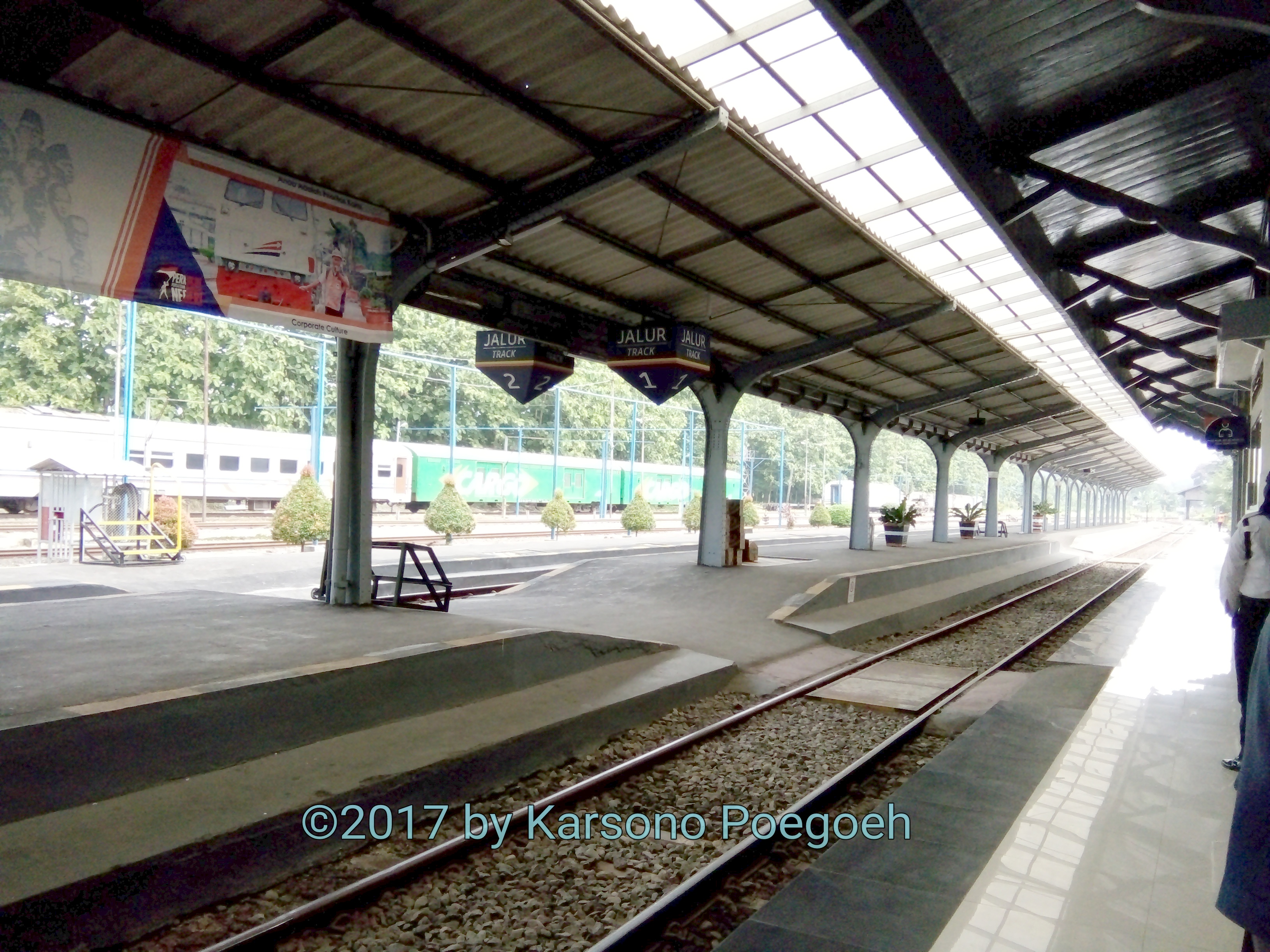 Peron Stasiun Jember arah timur (Sumber: Karya sendiri)